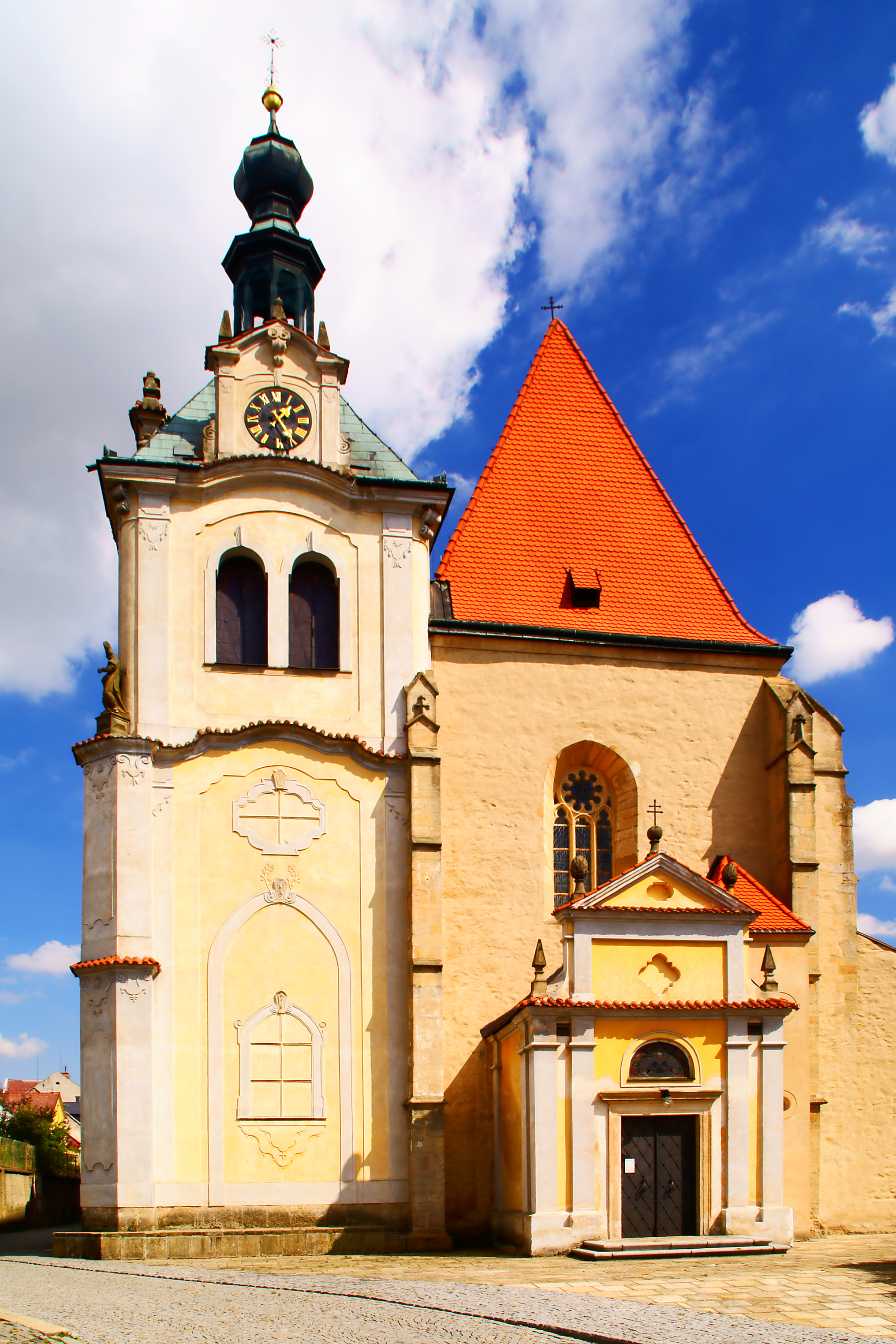 Kostel svatého Petra a Pavla ve Žluticích.